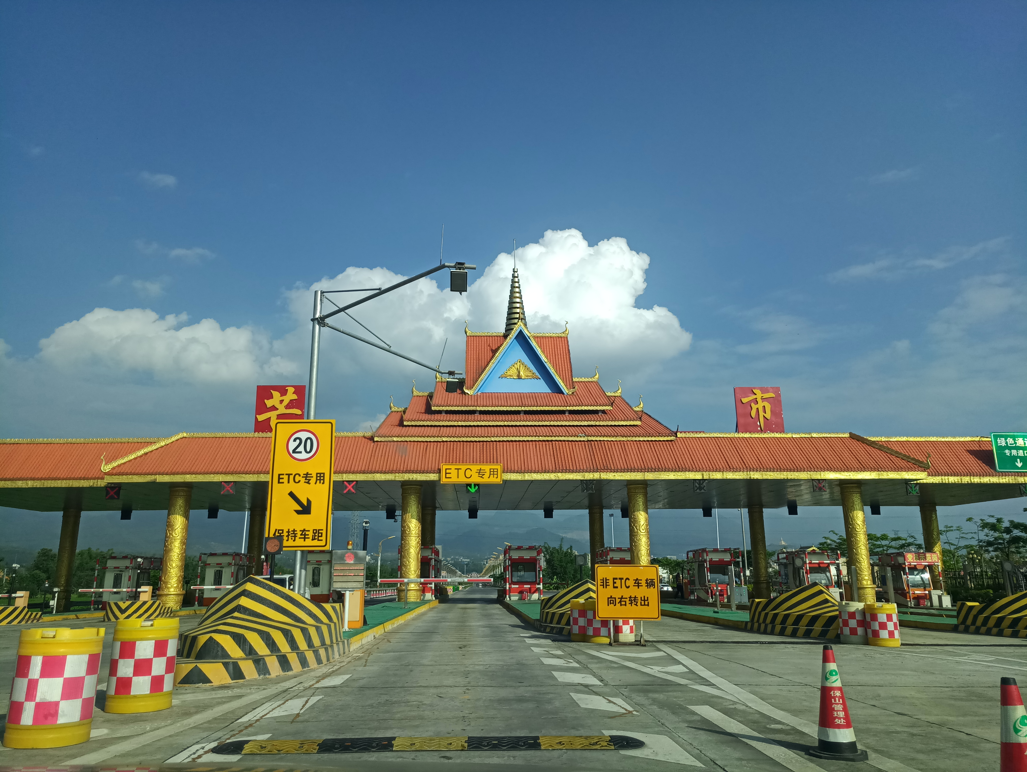 中文（中国大陆）: 杭瑞高速芒市出口